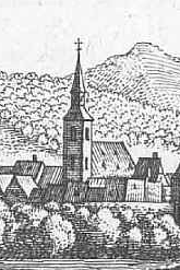 siehe Bildbeschreibung File:Allendorf (Lumda) De Merian Hassiae.jpg